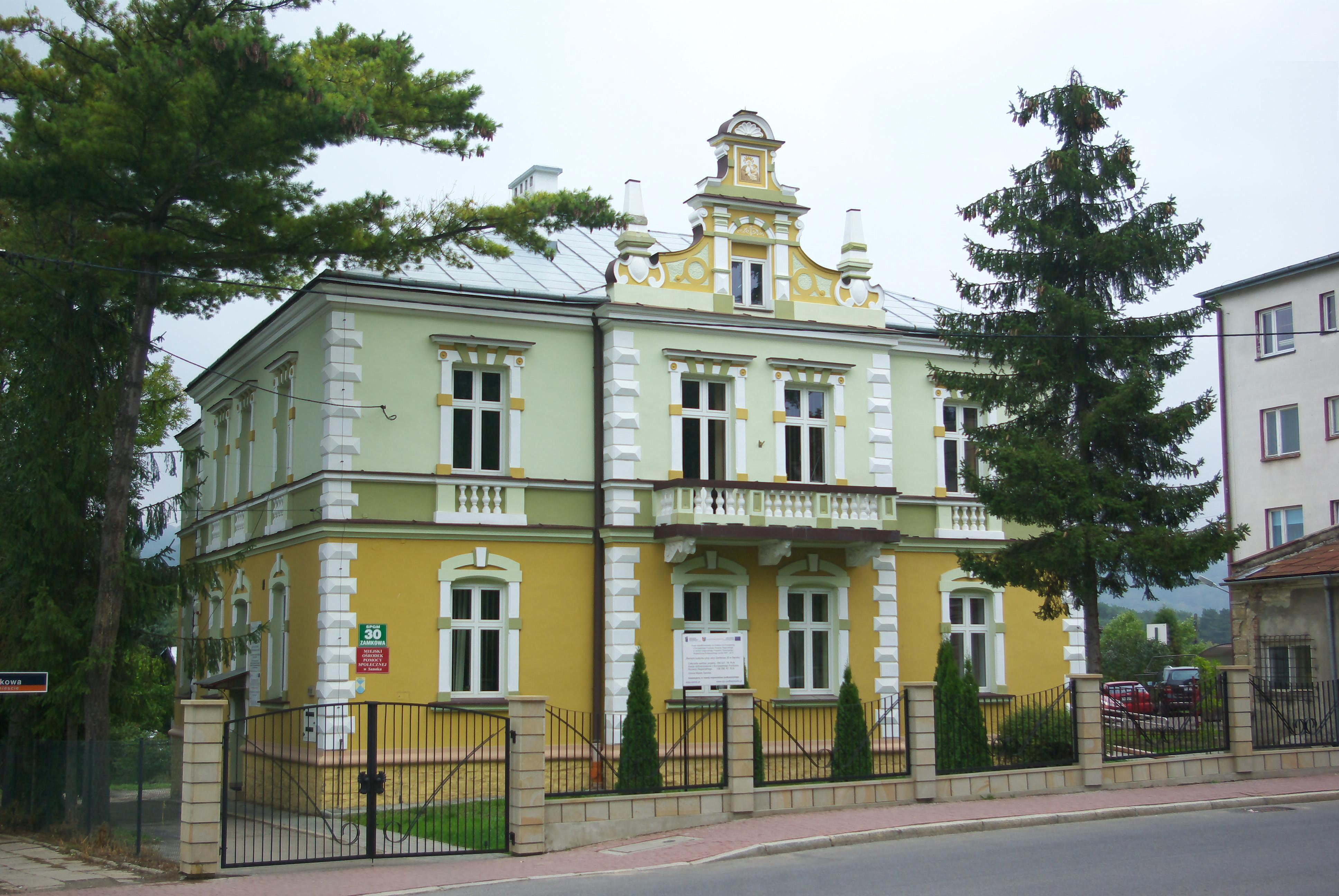 Kamienica przy ulicy Zamkowa 30 w Sanoku